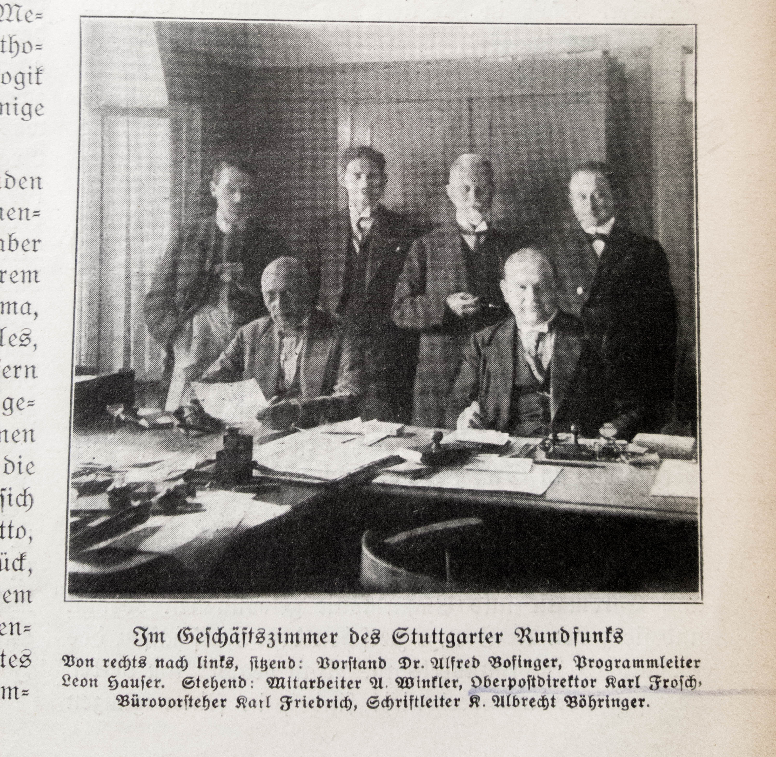 Das Geschäftszimmer des Stuttgarter Rundfunks. Fotograf unbekannt. Abgedruckt in der Programmzeitschrift "Südd. Rundfunk". Museum für Kommunikation, Depot Heusenstamm, unterstützt von Lioba Nägele.